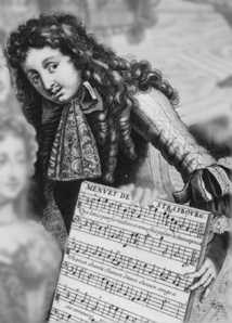 vermutliche Darstellung von M.A. Charpentier